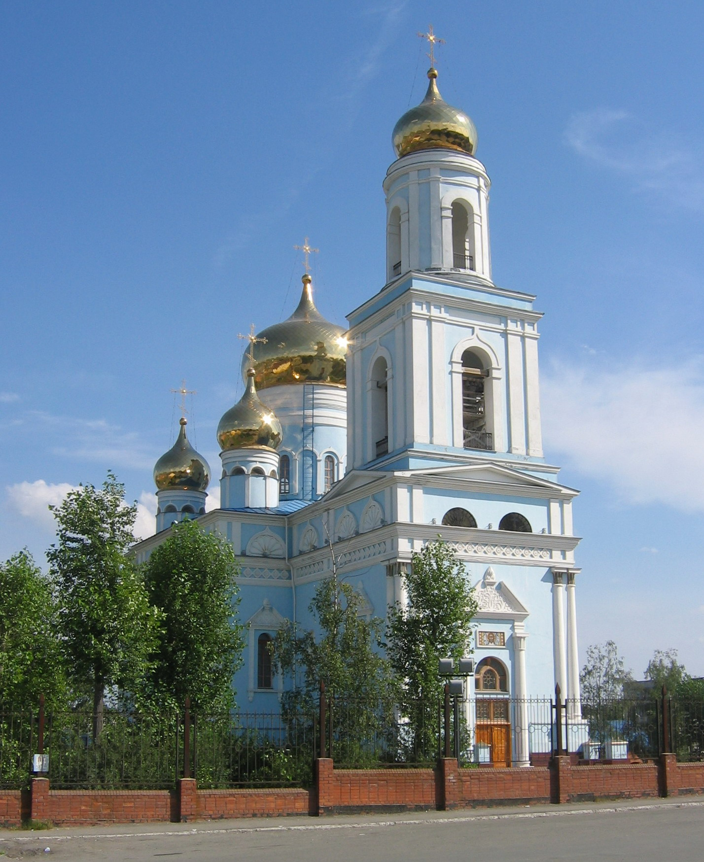 Максимовская церковь в Краснотурьинске (Свердловская облать, Россия).